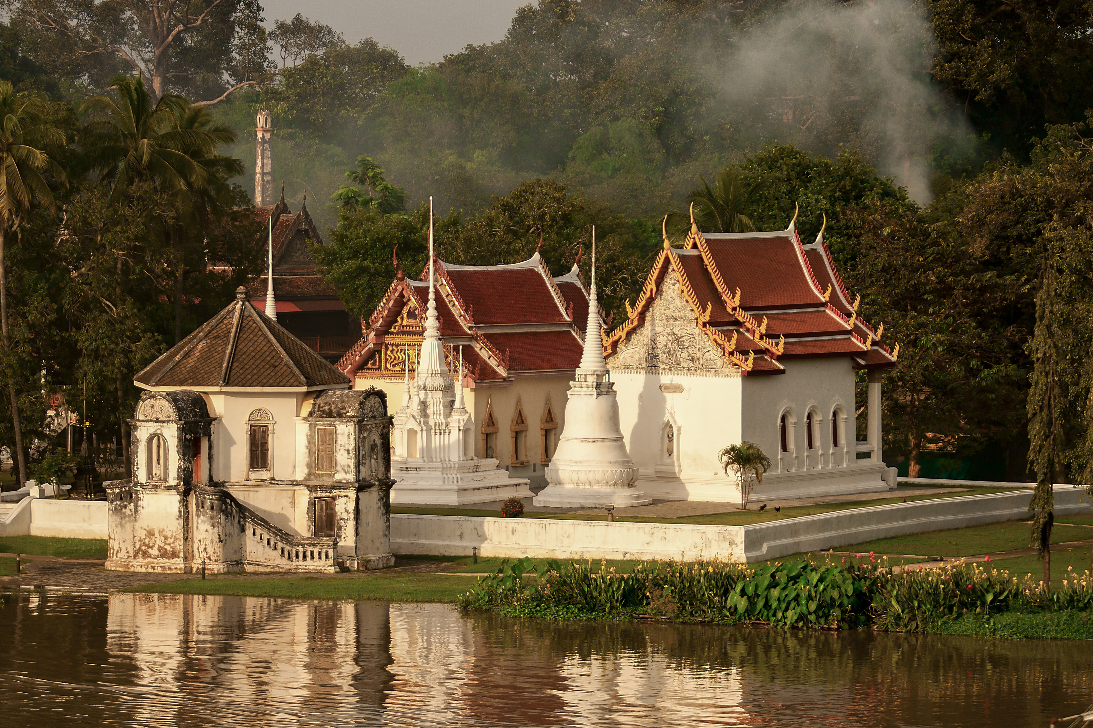 วัดอุโปสถาราม(อุโบสถาราม)